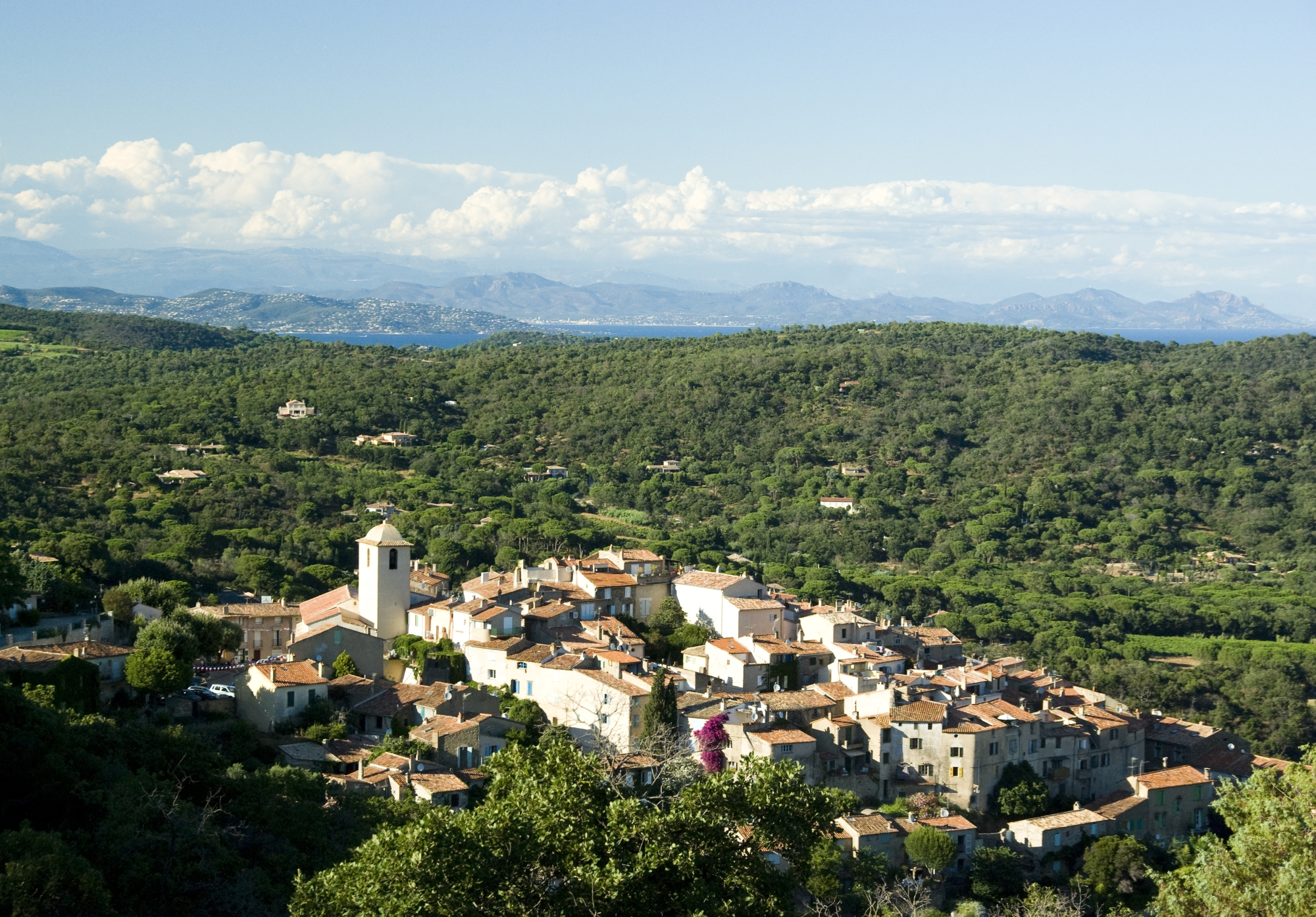 83350 Ramatuelle, France